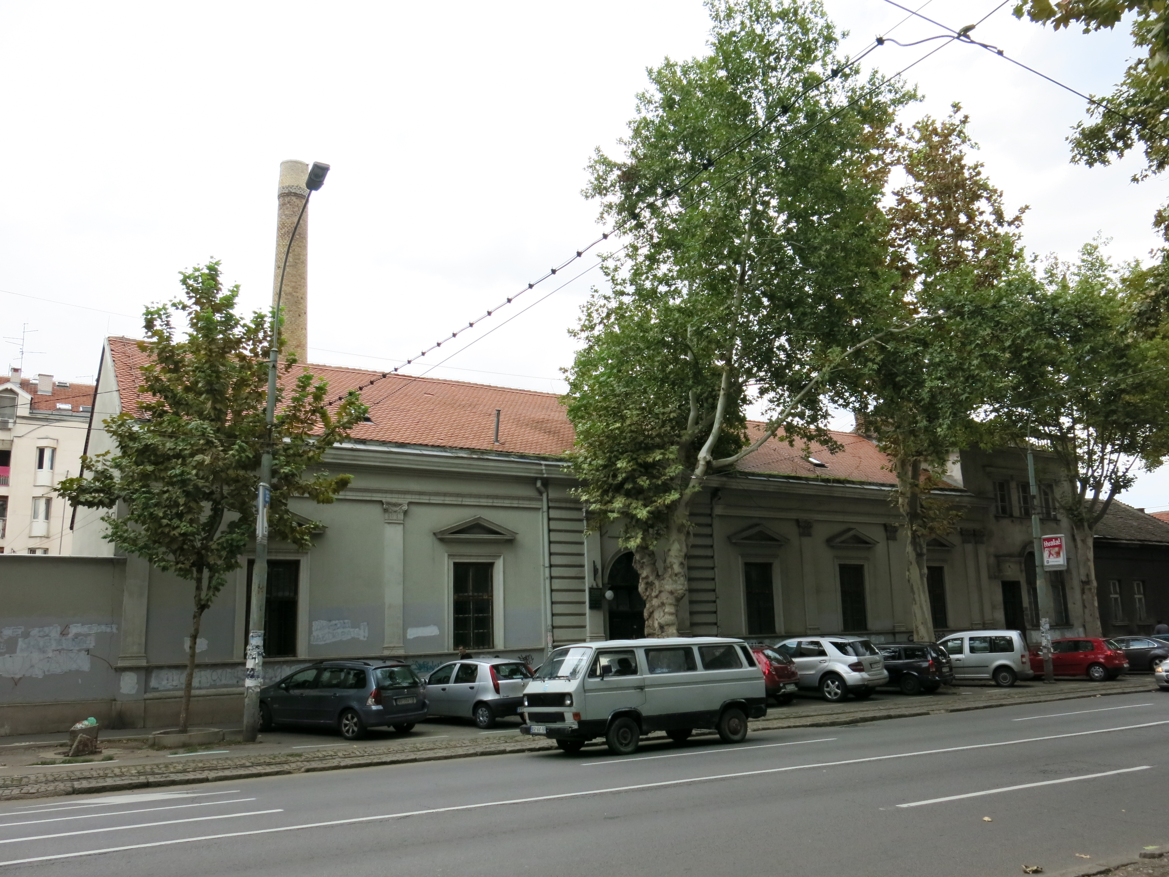 Парно купатило браће Крсмановић